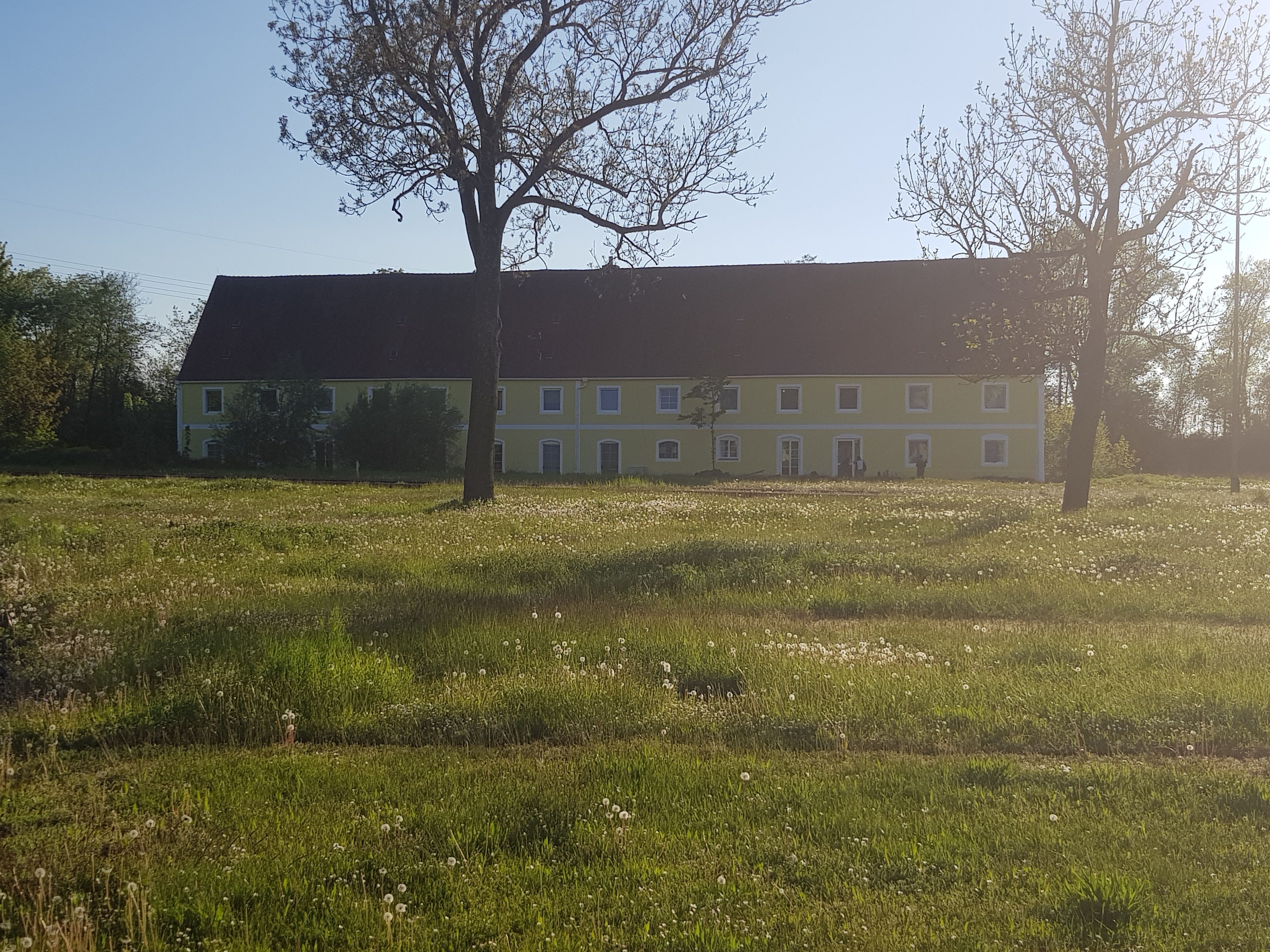 Gutshof Erlachhof bei Großmehring. Gutsweg 1, Großmehring-Interpark. Ansicht von Osten.